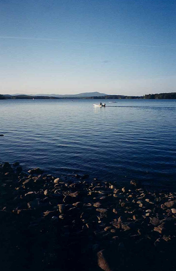 Umbagog Lake, NH